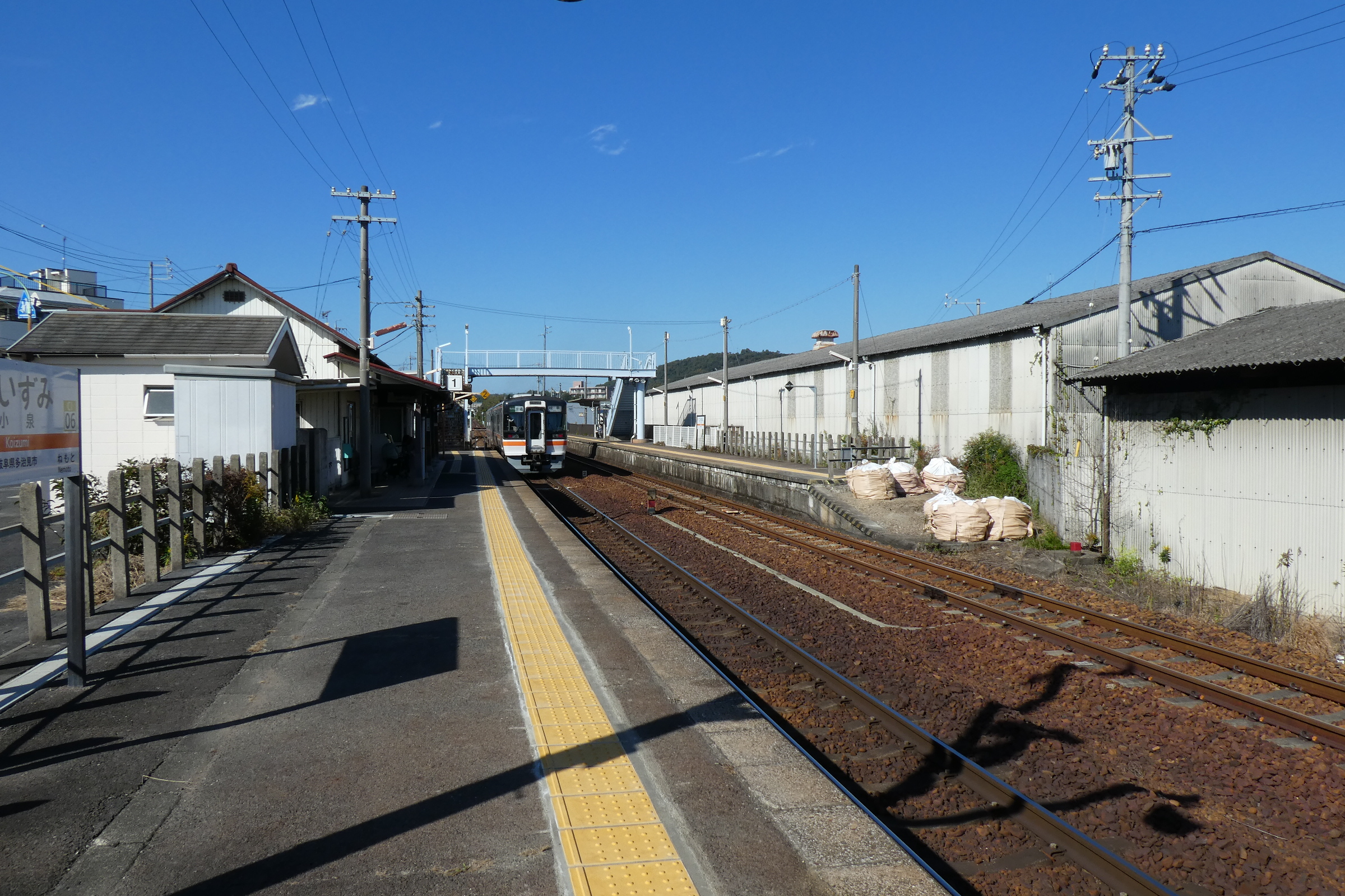 小泉駅構内。